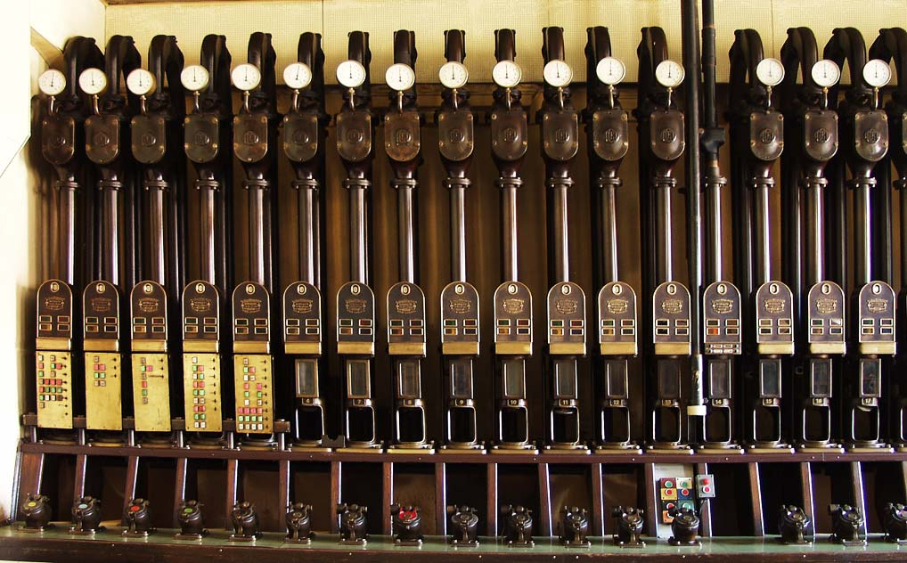 Hlavní ovládací panel pražské potrubní pošty Hornjoserbsce: Tutón wobraz pokazuje hłowy trasow Praskeho rołeho pósta